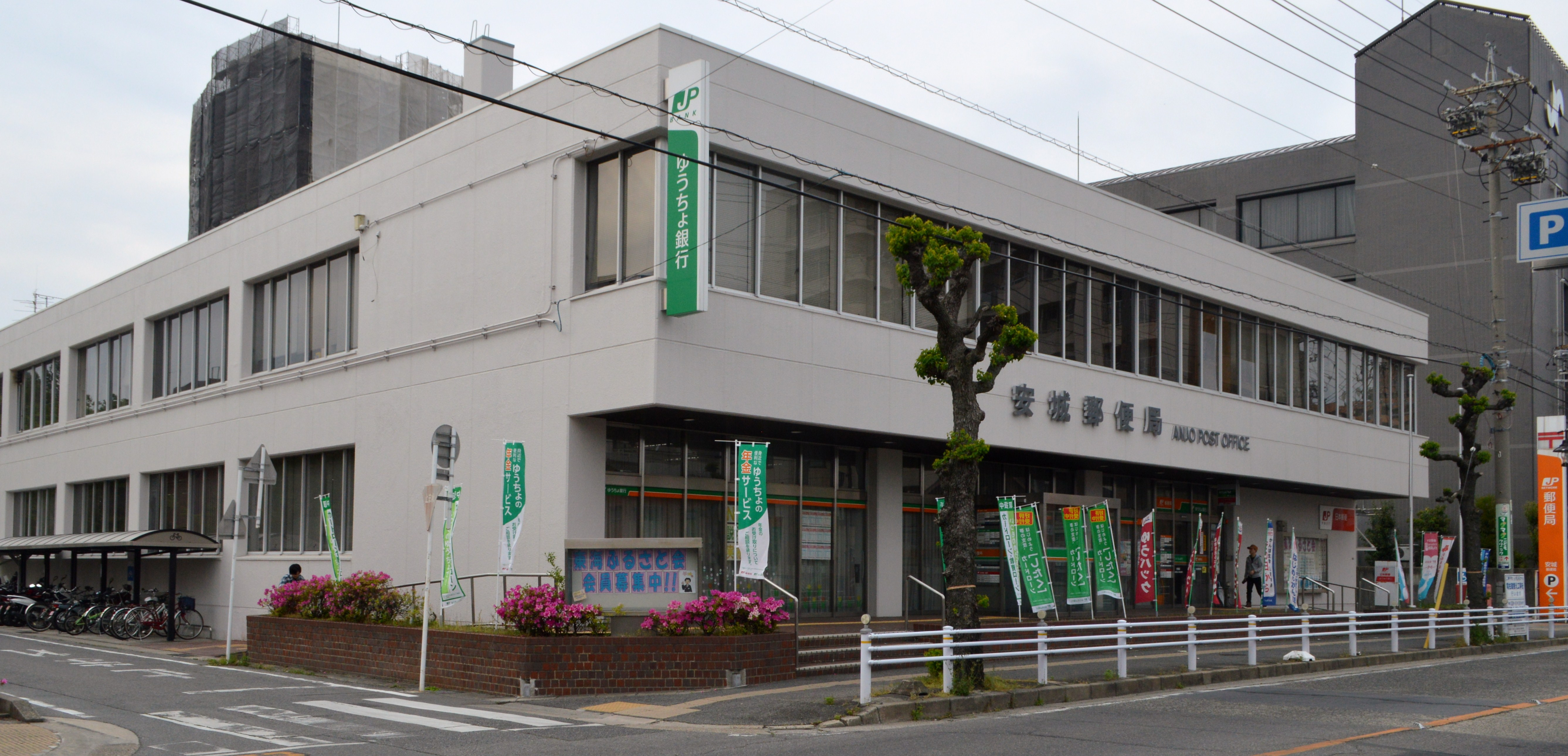 安城郵便局、愛知県安城市